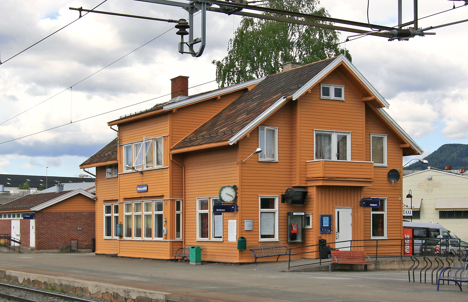 Brumunddal stasjon, Dovrebanen.